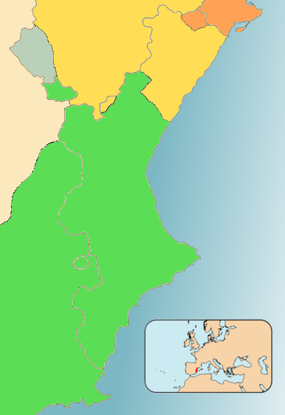 Mapa del País Valencià el 1235